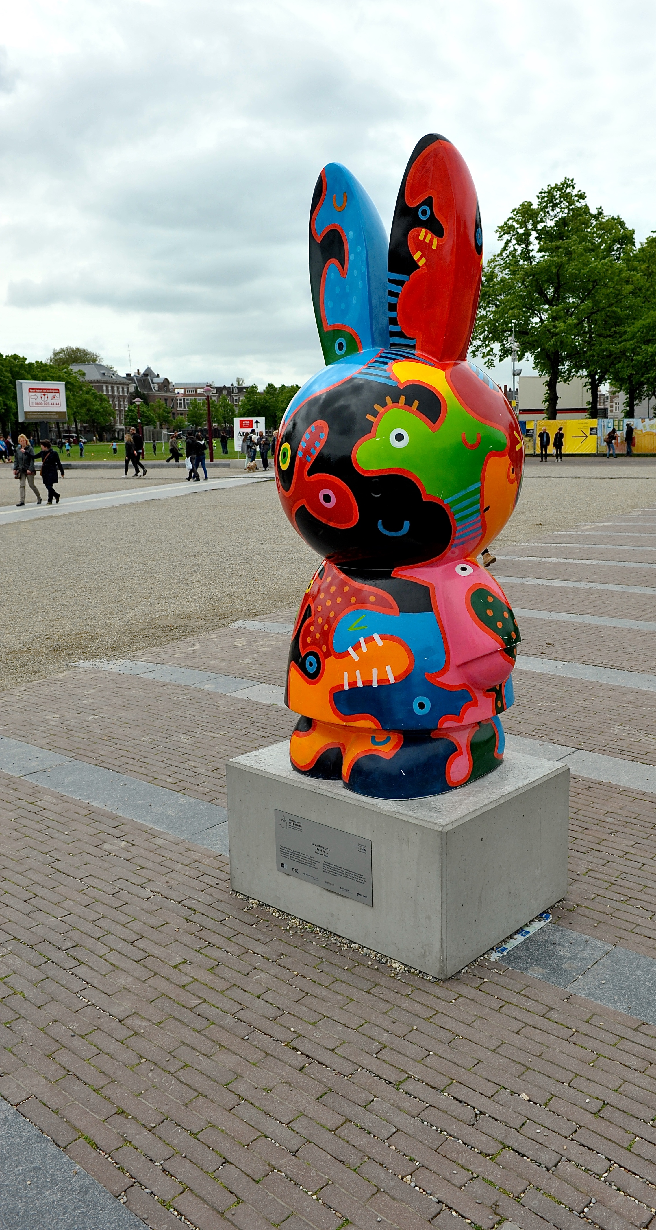 'Ik voel me zo... (I feel so)' van de Nederlandse kunstenaar Mies van Hout (Eindhoven 1962). Nijntje, bedacht door de Nederlandse kunstenaar Dick Bruna, viert dit jaar haar 60ste verjaardag. De Nijntje art parade, die op meerdere plekken in Nederland wordt gehouden, is een ode aan Nijntje en haar bedenker.